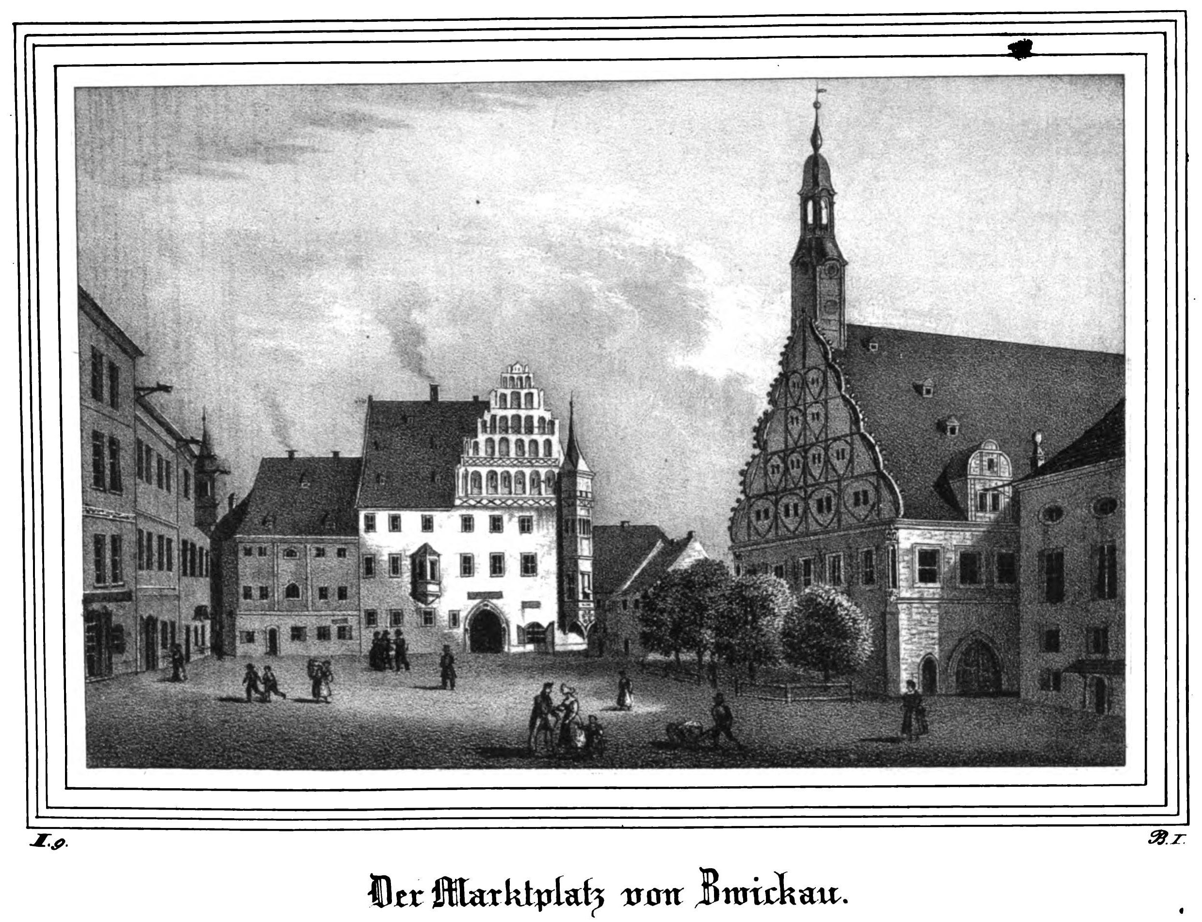 Saxonia Museum für saechsische Vaterlandskunde. Band 2. Dresden: Pietzsch und Comp. Siehe File:Saxonia Museum für saechsische Vaterlandskunde II.djvu